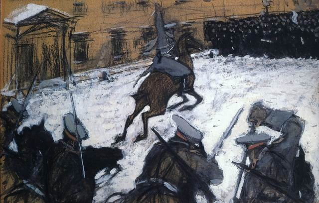 Серов В.А. «Солдатушки, бравы ребятушки, где же ваша слава?» 1905 Картон, пастель, гуашь. 47,5 х 41,5 Государственный Русский музей Работа поступила в Русский музей в 1918 году из художественного бюро Н.Е.Добычиной, Петроград; ранее – собрание М.Горького (дар автора), Петроград. Воспроизведена в журнале «Жупел» (1905, № 1). Традиционно композиция связывается с событиями 9 января 1905 г. в Петербурге. По предположению И.С.Зильберштейна и В.А.Самкова, изображен разгон демонстрации в Москве, близ Училища живописи, ваяния и зодчества в октябре 1905. Одна из самых острых сатир на царизм времени первой русской революции 1905-1907 годов создана Валентином Серовым, с начала 1890-х годов выполнявшим заказы царской семьи. Она появилась под впечатлением разгона войсками мирной демонстрации. В знак протеста Серов отказался от почетного звания действительного члена Академии Художеств, президентом которой был великий князь Владимир, командовавший войсками столичного гарнизона. Саркастически звучит уже само название работы – строка из русской солдатской песни. Композиция была подарена Максиму Горькому, входившему, как и Серов, в редакцию журнала «Жупел».